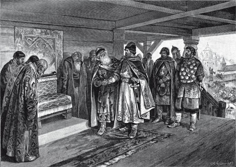 Это гравюра Шлипера с оригинального рисунка Клавдия Лебедева «Князь Изяслав Мстиславич предлагает мир и дружбу дяде своему Вячеславу». До 1917 года находилась в собственности журнала «Нива».